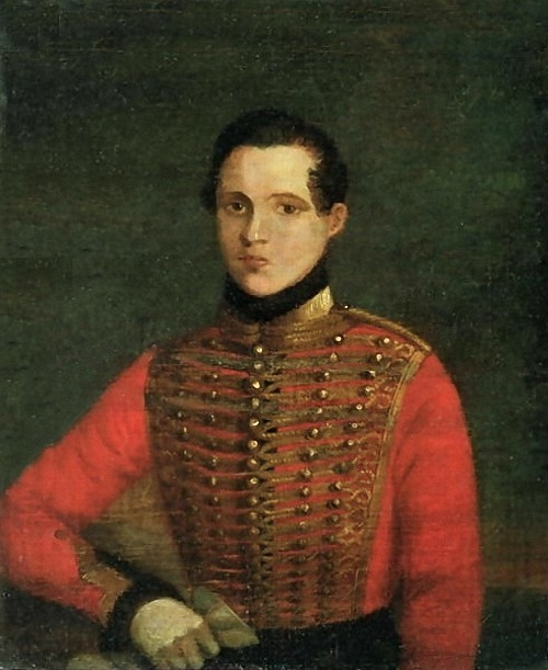 Лермонтов юнкер лейб-гвардии Гусарского полка